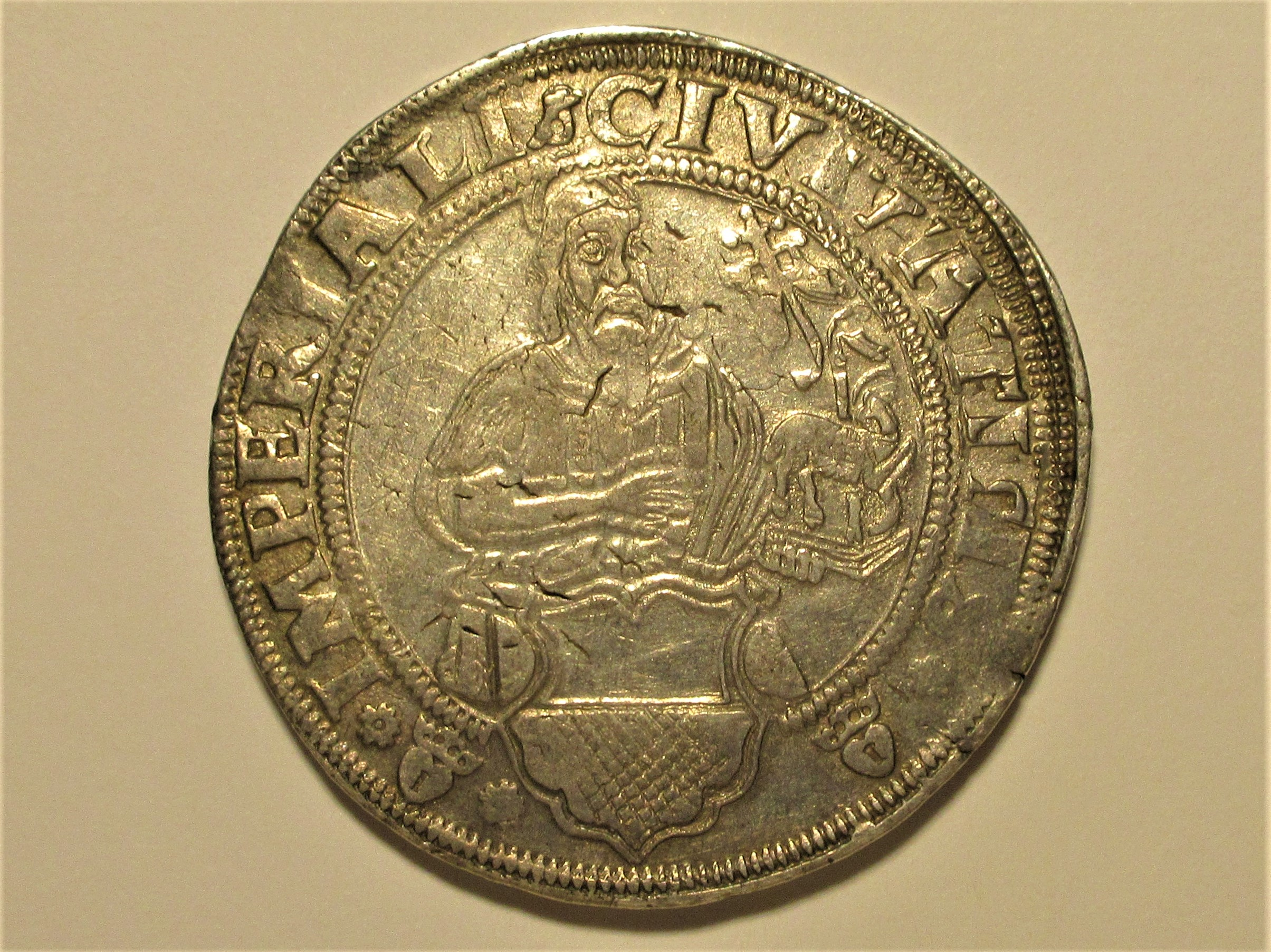 Lübecker Taler von 1559, Bürgermeister Ambrosius Meyer, Behrens 100, Davenport 9408